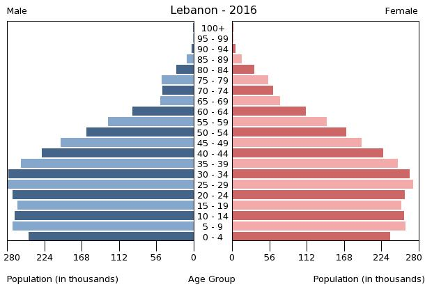 A population pyramid illustrates the age and sex structure of a country's population and may provide insights about political and social stability, as well as economic development. The population is distributed along the horizontal axis, with males shown on the left and females on the right. The male and female populations are broken down into 5-year age groups represented as horizontal bars along the vertical axis, with the youngest age groups at the bottom and the oldest at the top. The shape of the population pyramid gradually evolves over time based on fertility, mortality, and international migration trends.